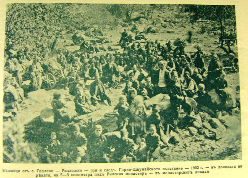 Бежанци от Годлево след Горноджумайското въстание в 1902 година